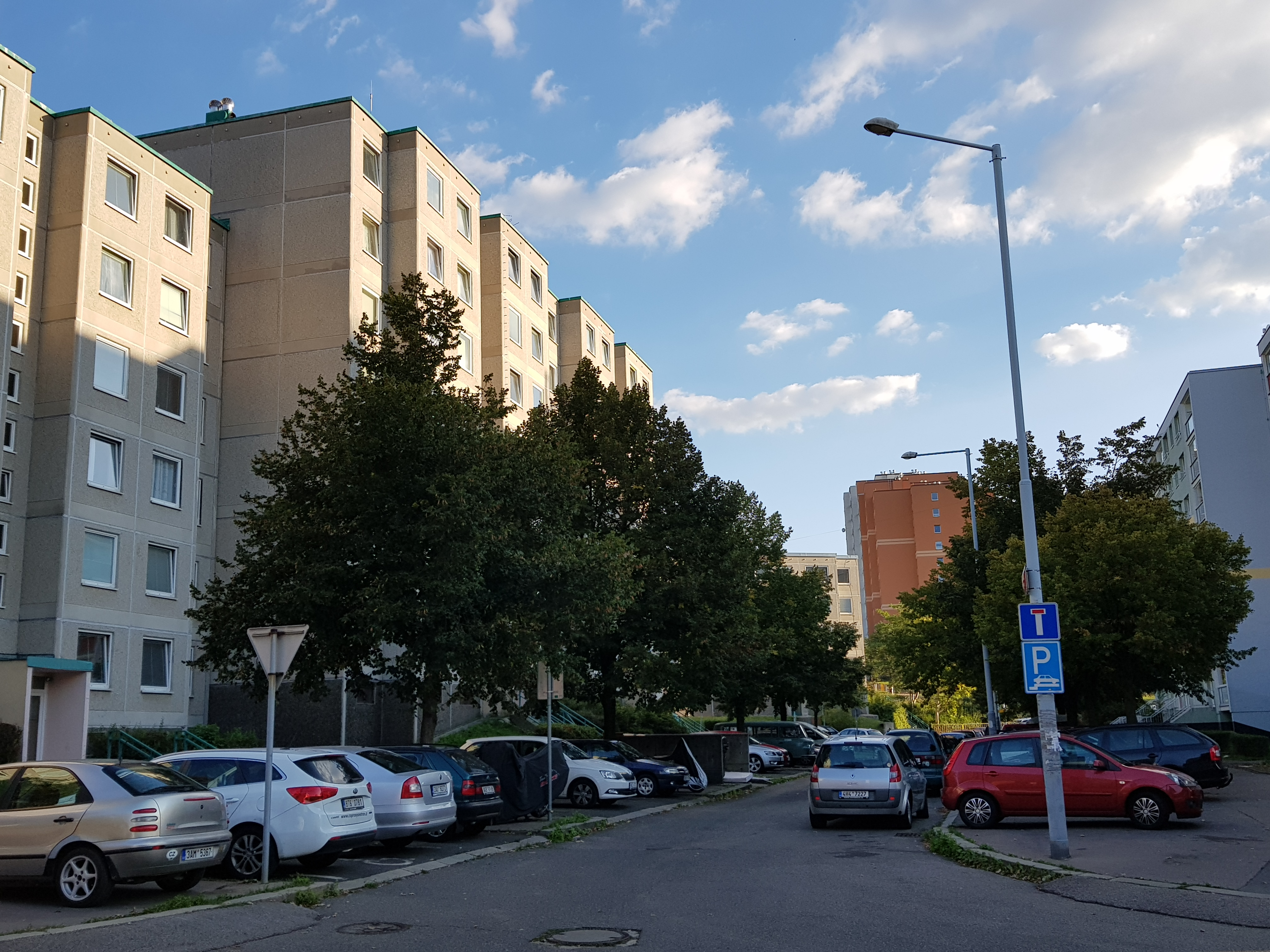 Rochovská ulice, Praha 14 - Hloubětín, pohled z Kardašovské směrem na jih